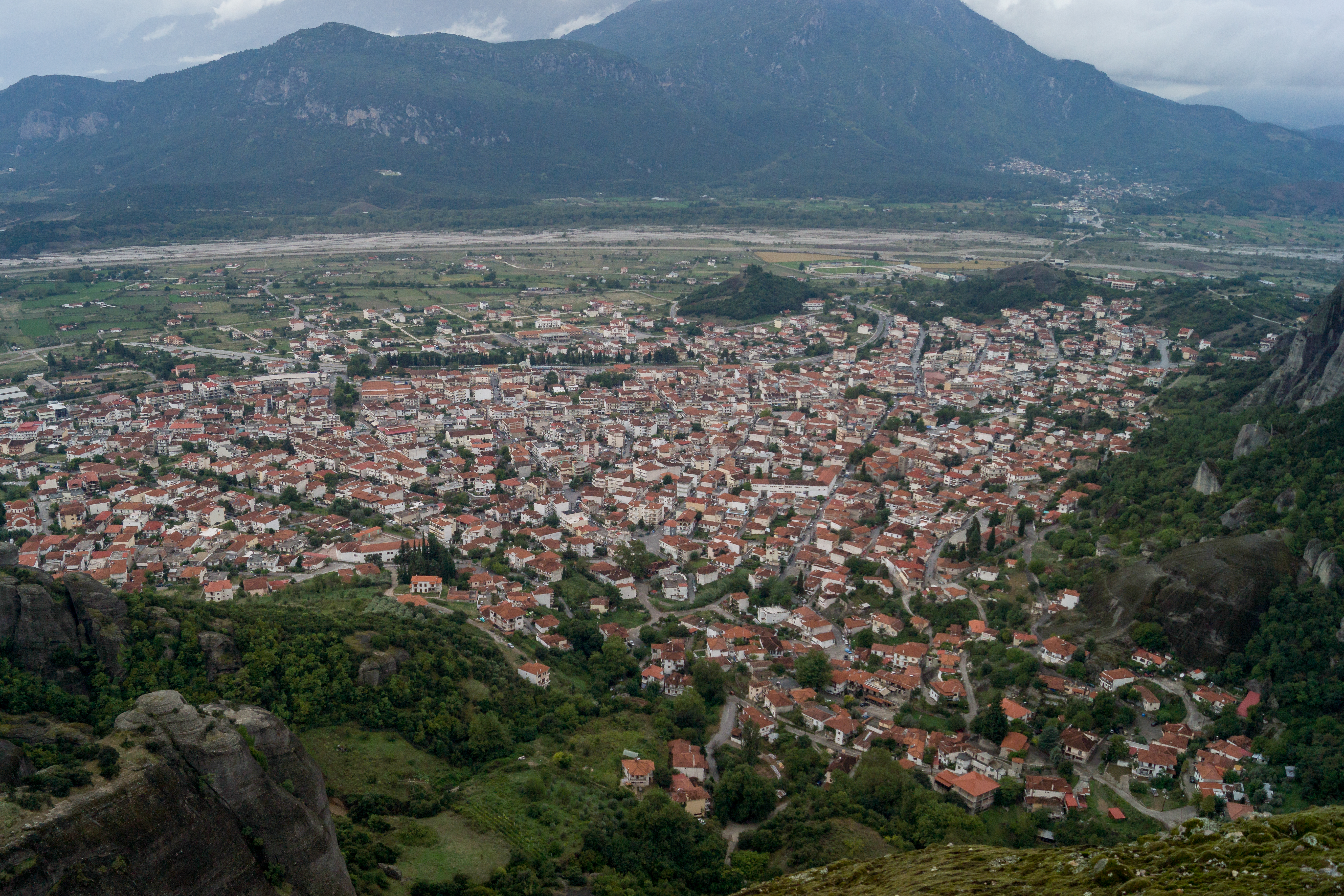 Die Stadt Kalambaka, gesehen vom Meteora-Kloster Agías Tríados, Griechenland. Hinten der Fluss Pinios.